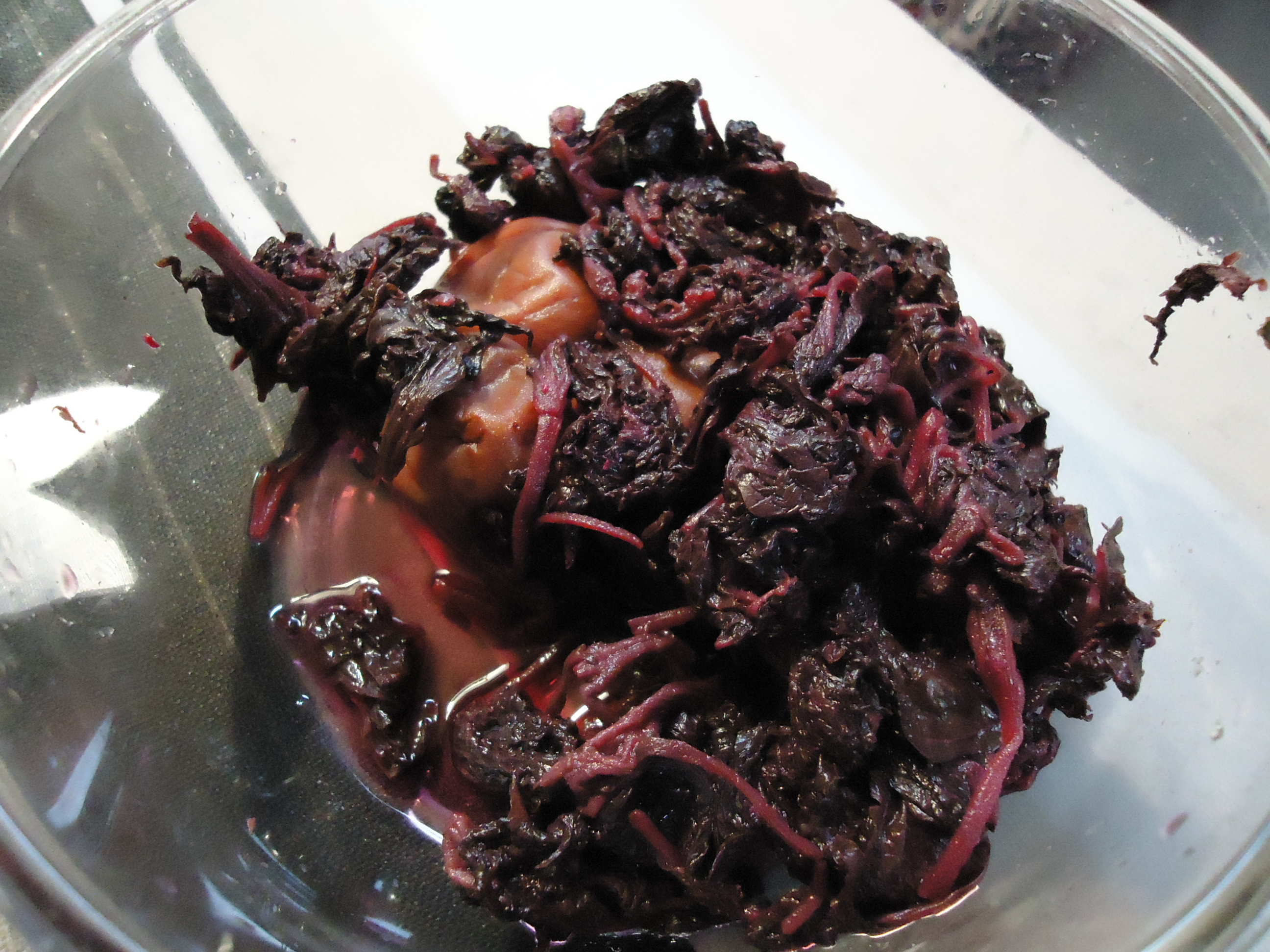 梅干と混ぜたシソ